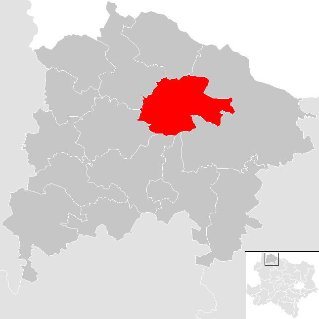 Bezirk Waidhofen an der Thaya